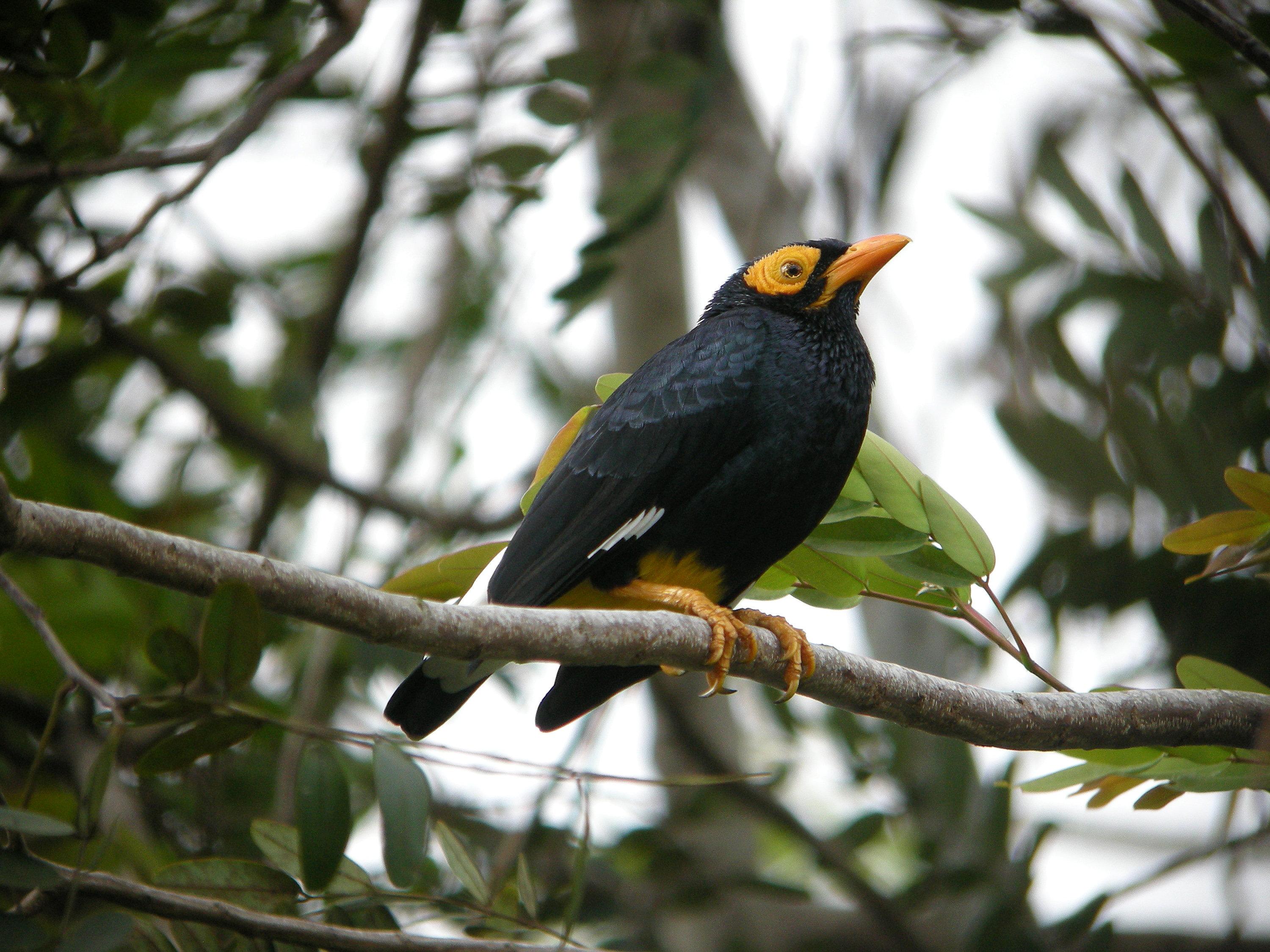 Mino dumontii